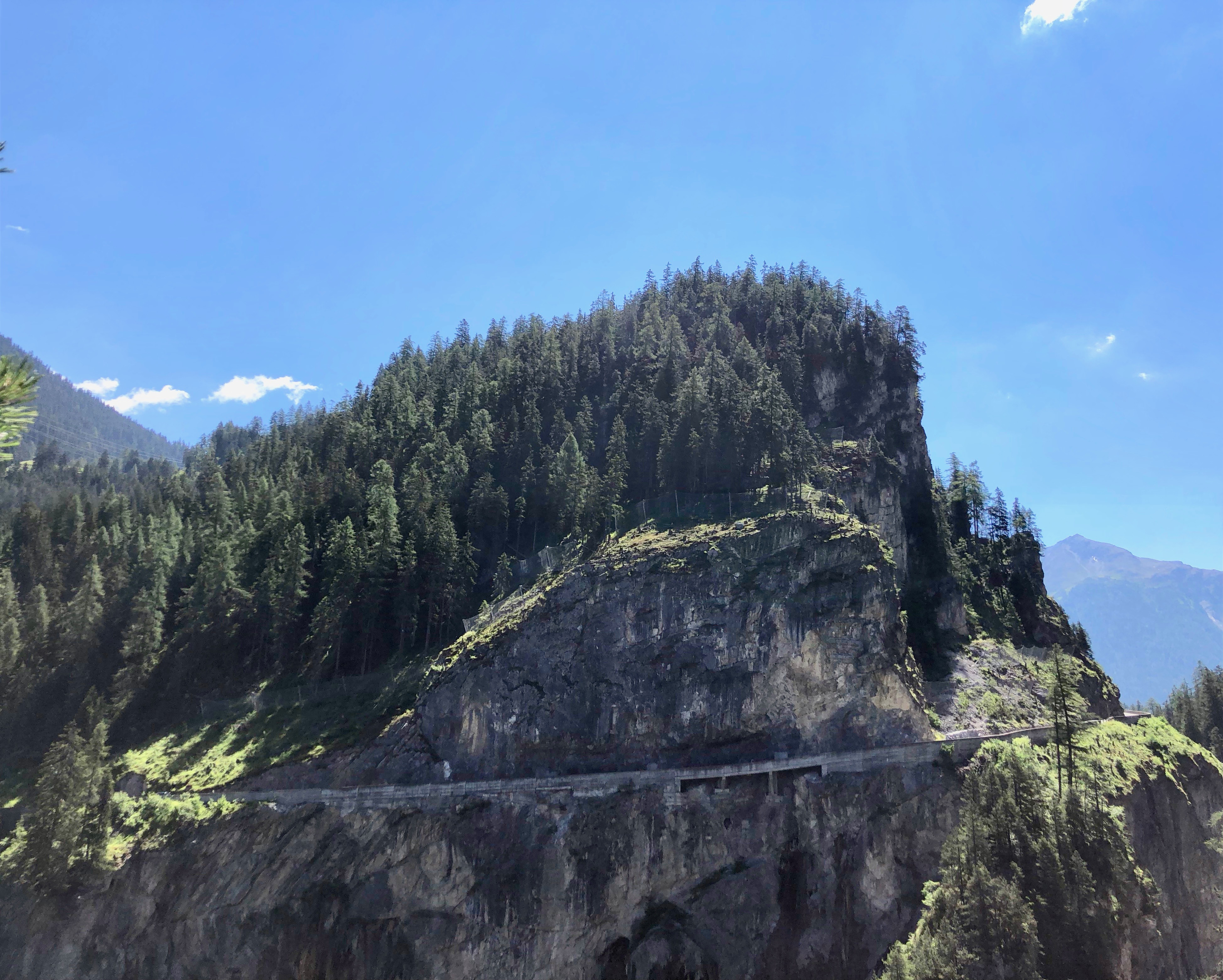 de: Bergünerstein